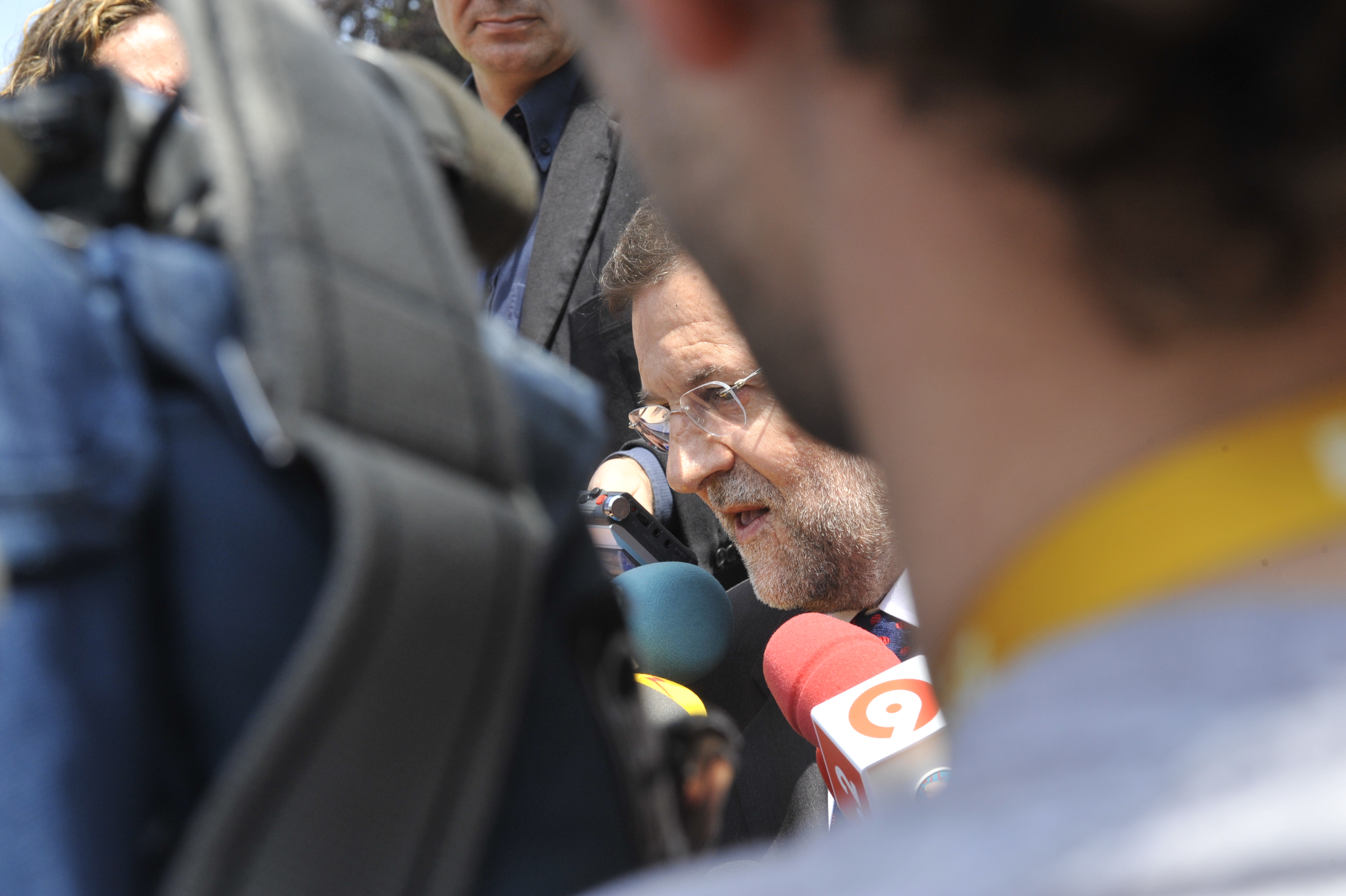 EPP Summit 18 June 2009